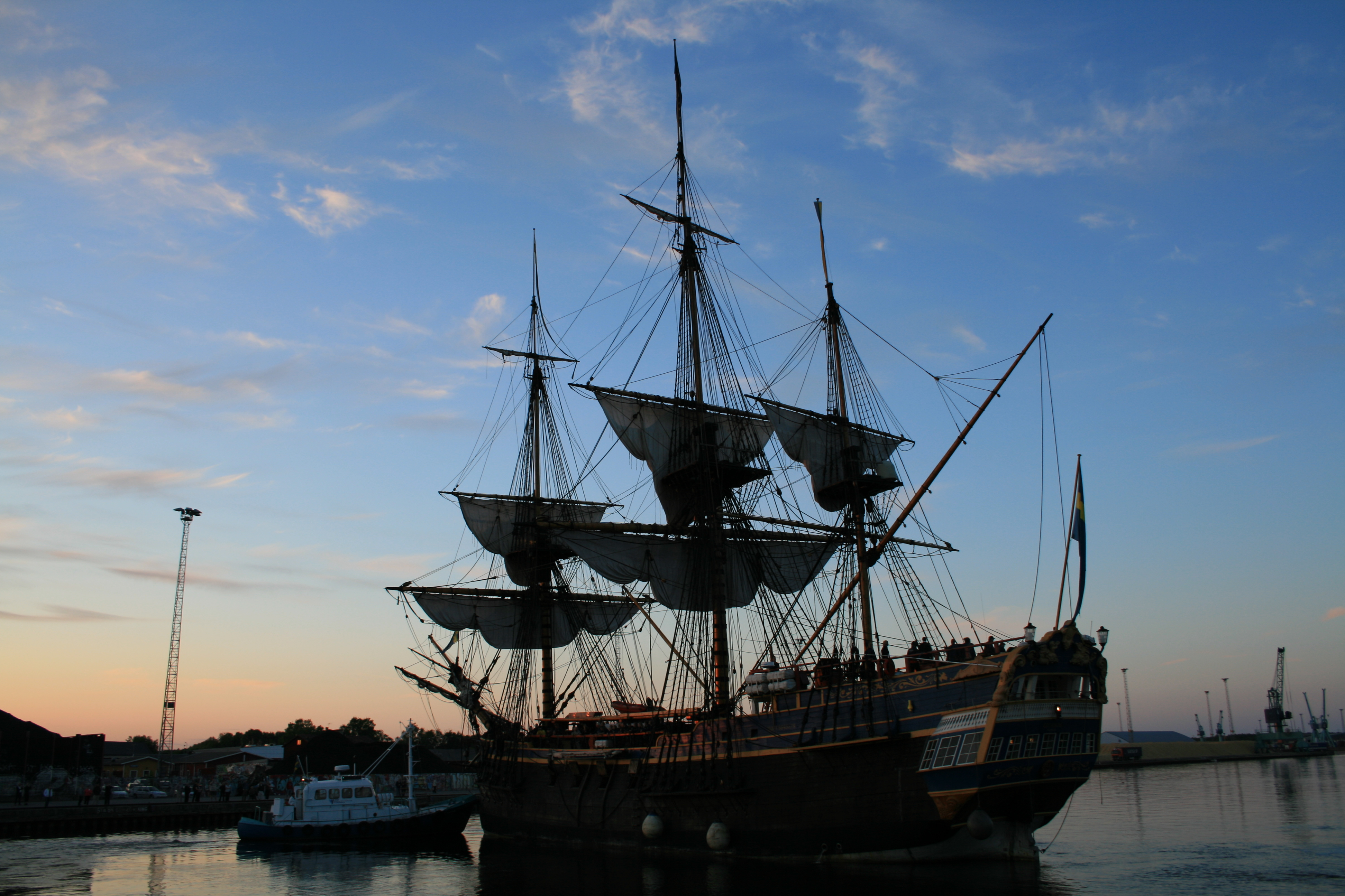 Ostindienfararen Götheborg besöker Norrköping, maj 2008. Avfärd.